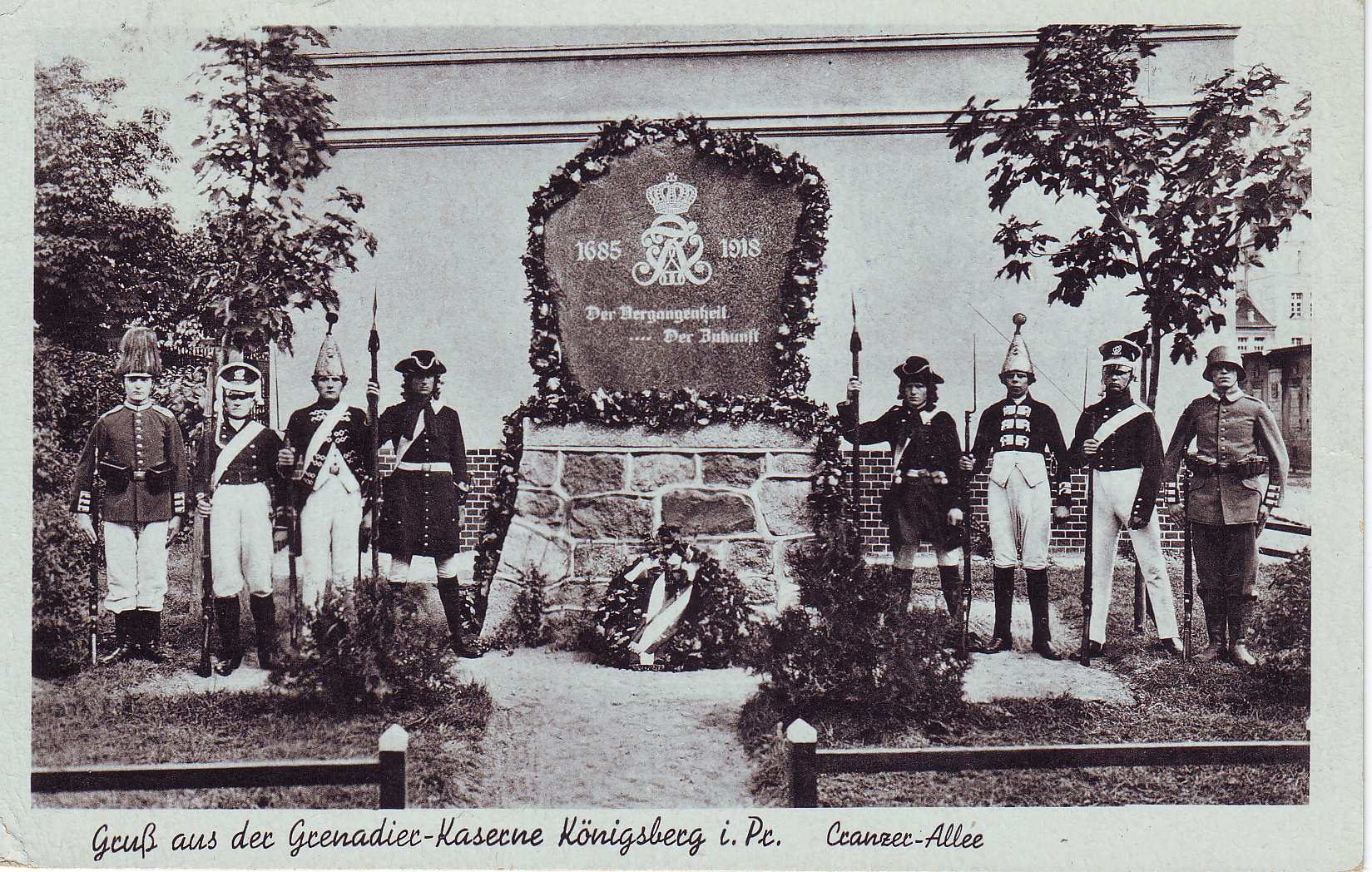 Der Gedenkstein des "Grenadier-Regiment König Friedrich Wilhelm I. (2. Ostpreußisches) Nr. 3" aus dem Jahre 1923